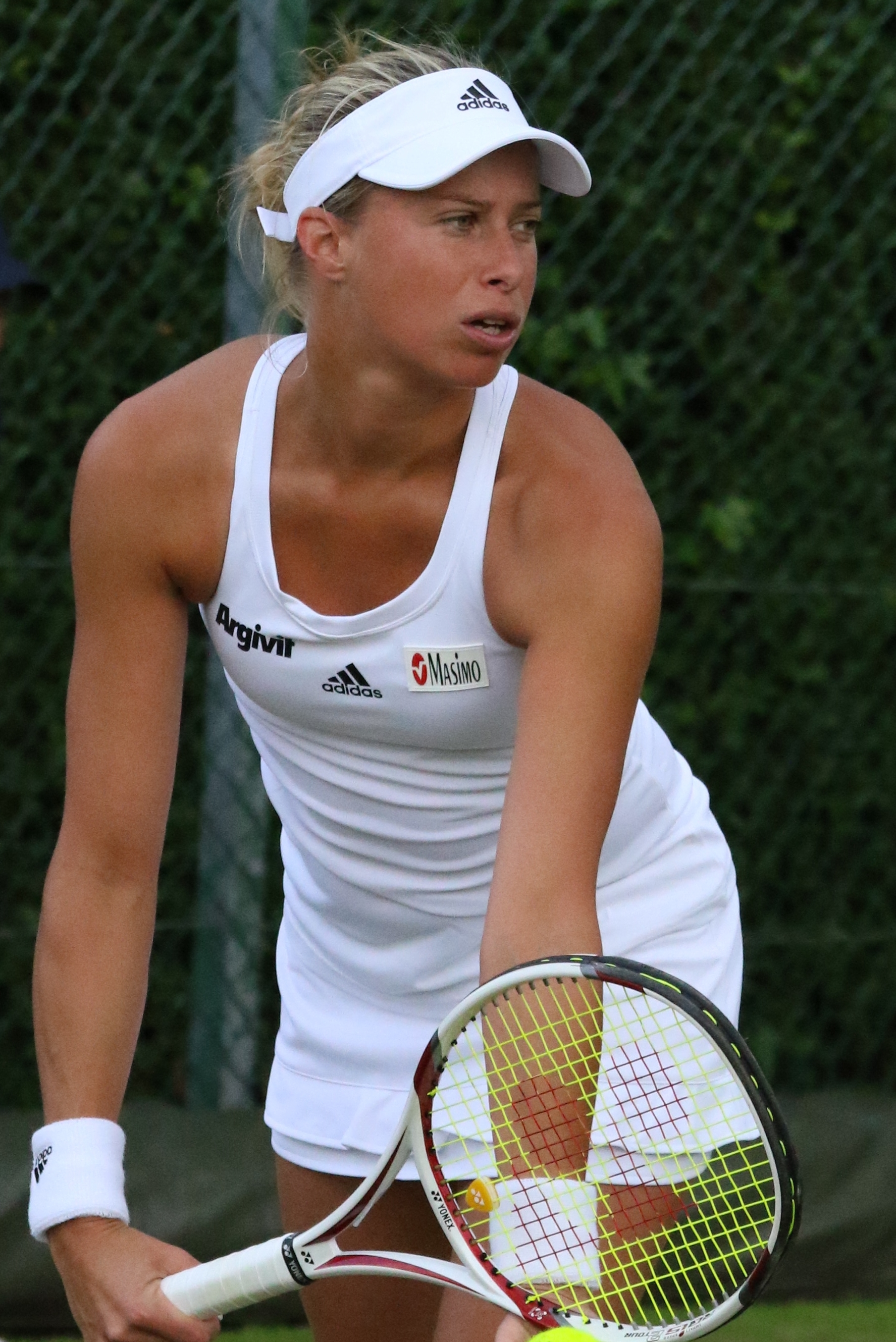 Hlavackova WMQ16 (3)